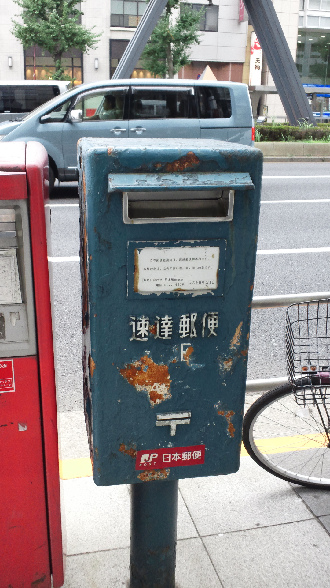 速達郵便専用ポスト。東京駅八重洲口付近にて撮影